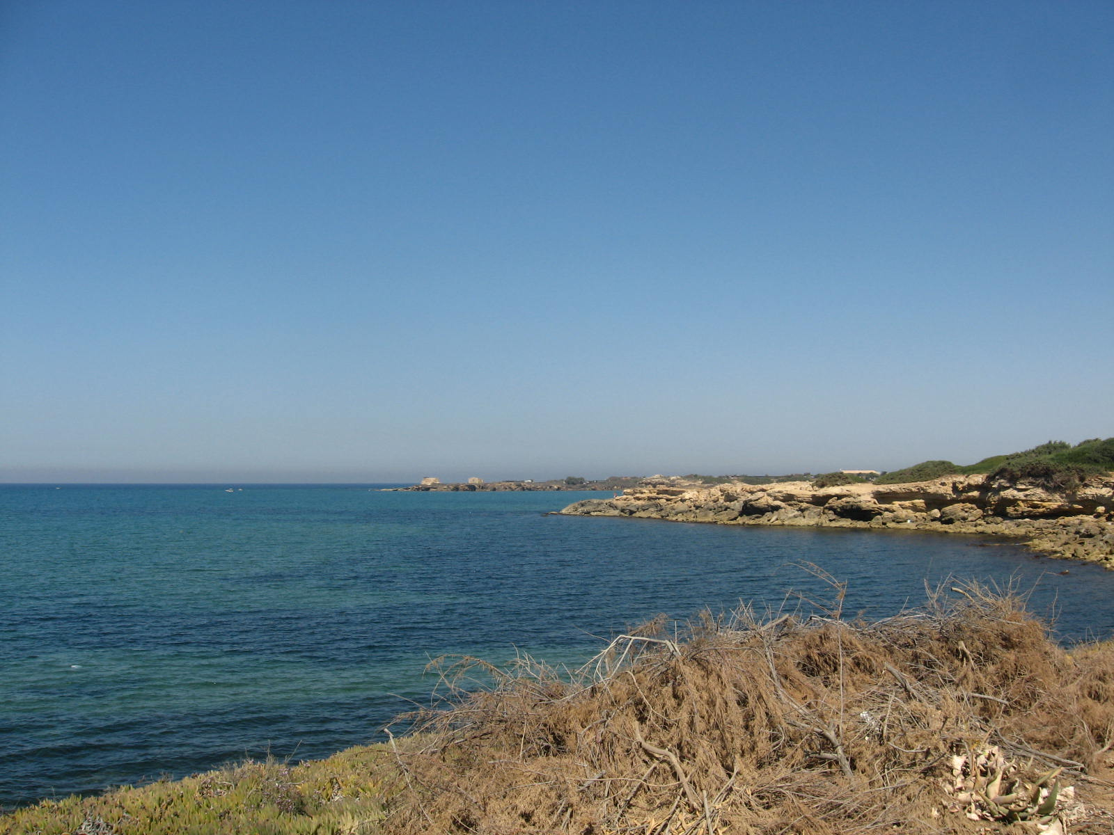 Vista di punta braccetto